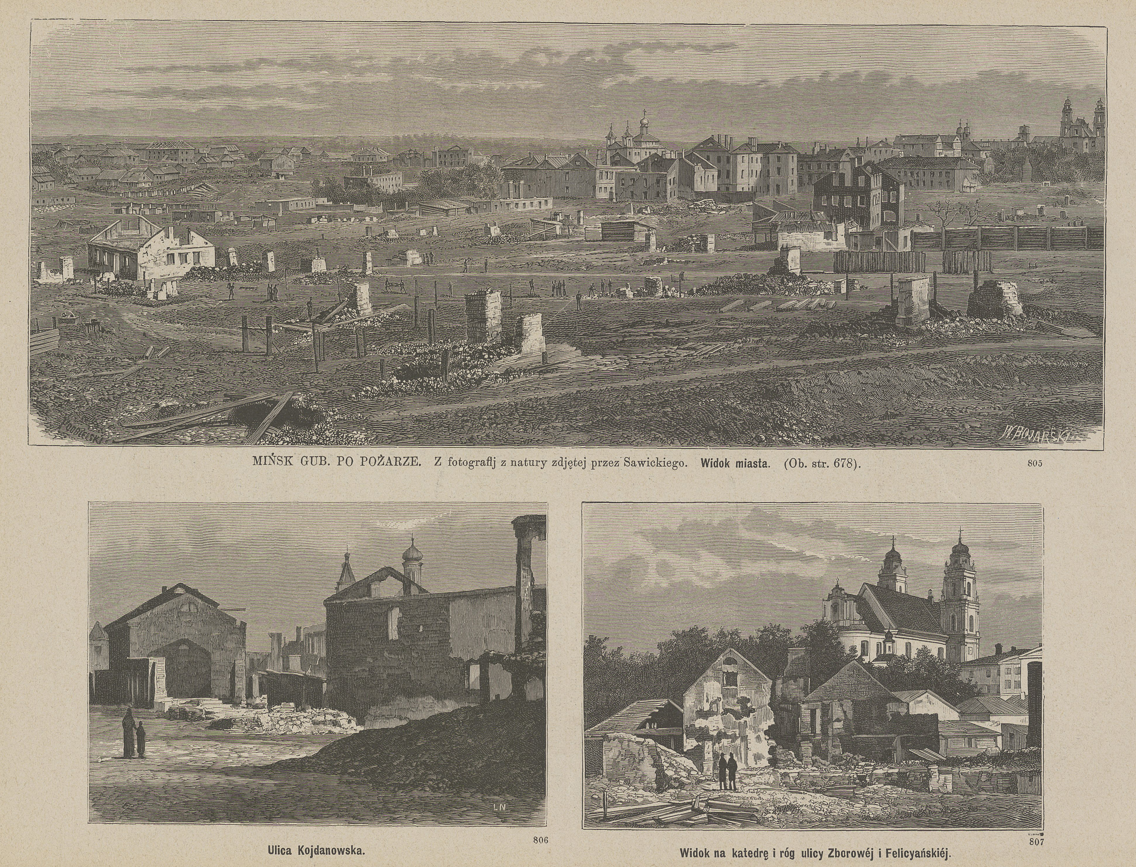 Беларуская (тарашкевіца): Менск (Miensk) па пажары. Традыцыйная гістарычная назва/назвы ў подпісе